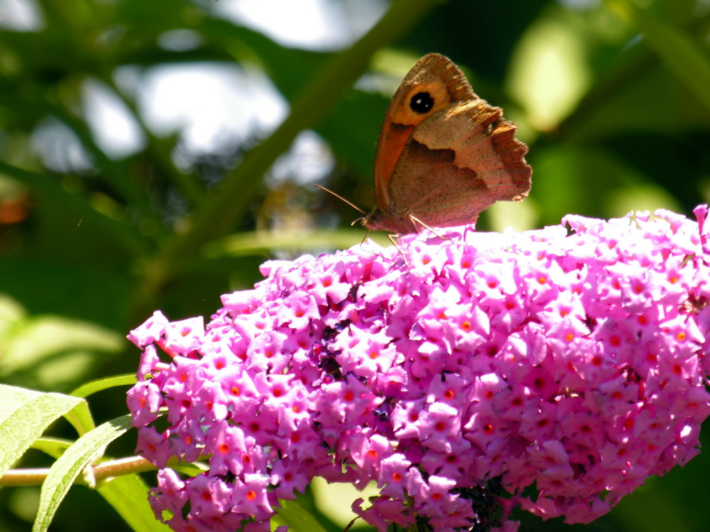 Maniola jurtina (Linnaeus, 1758).